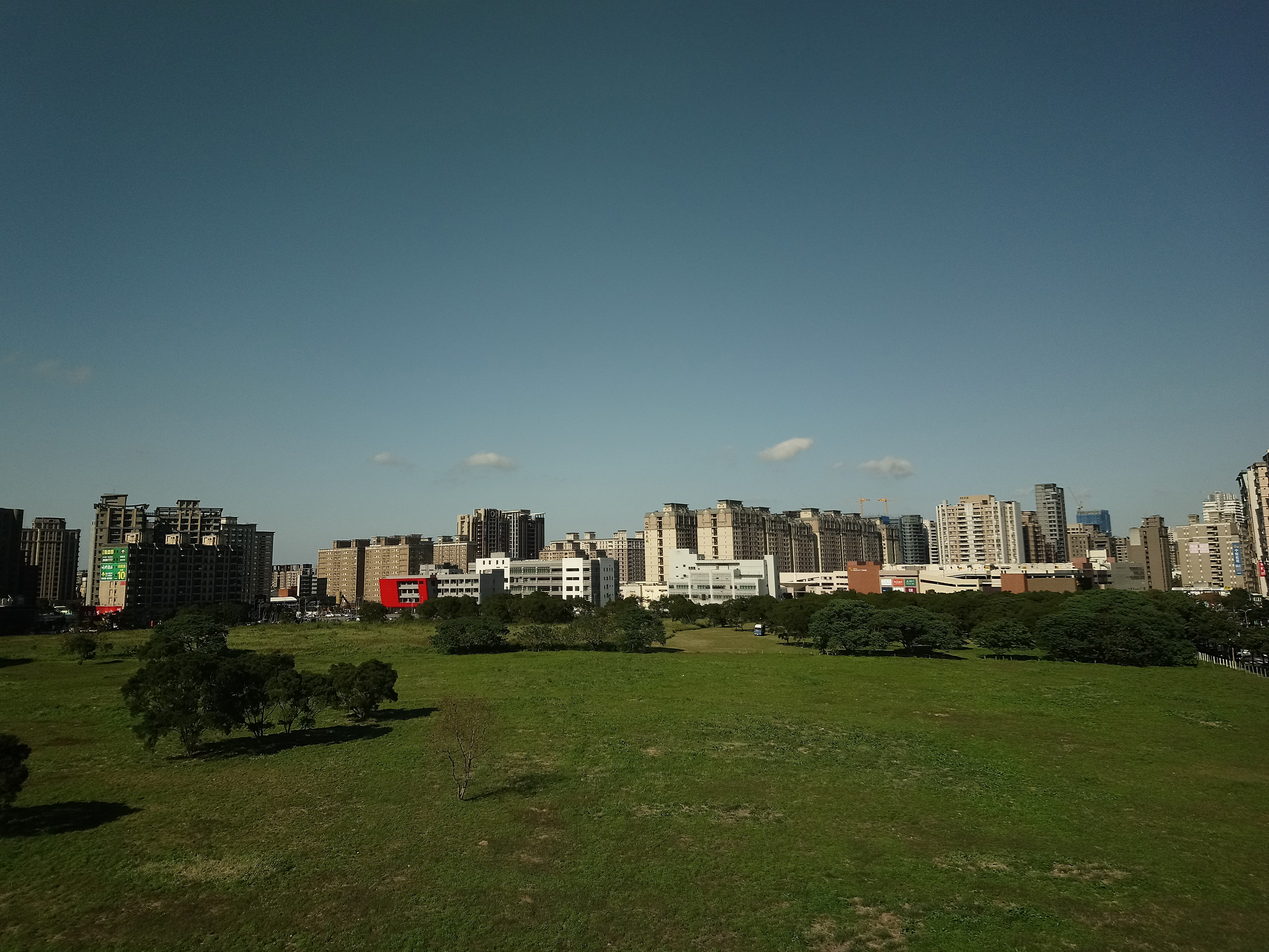 新北市林口區南勢埔,新北市林口區南勢里